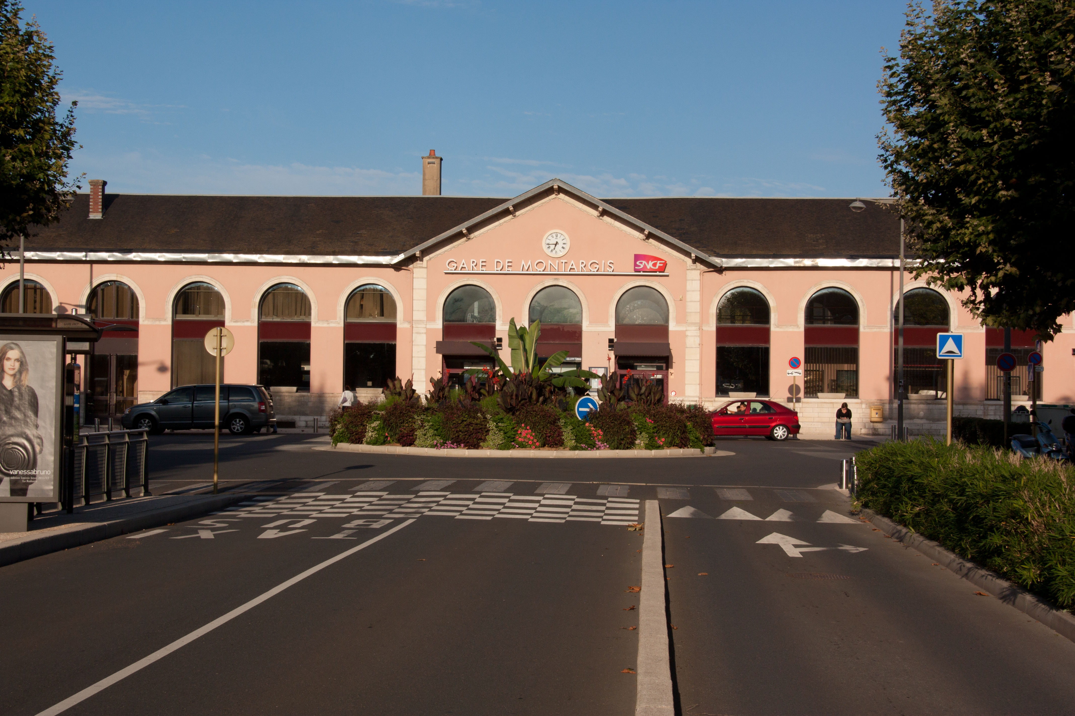 Gare de Montargis, Montargis, Loiret, France.